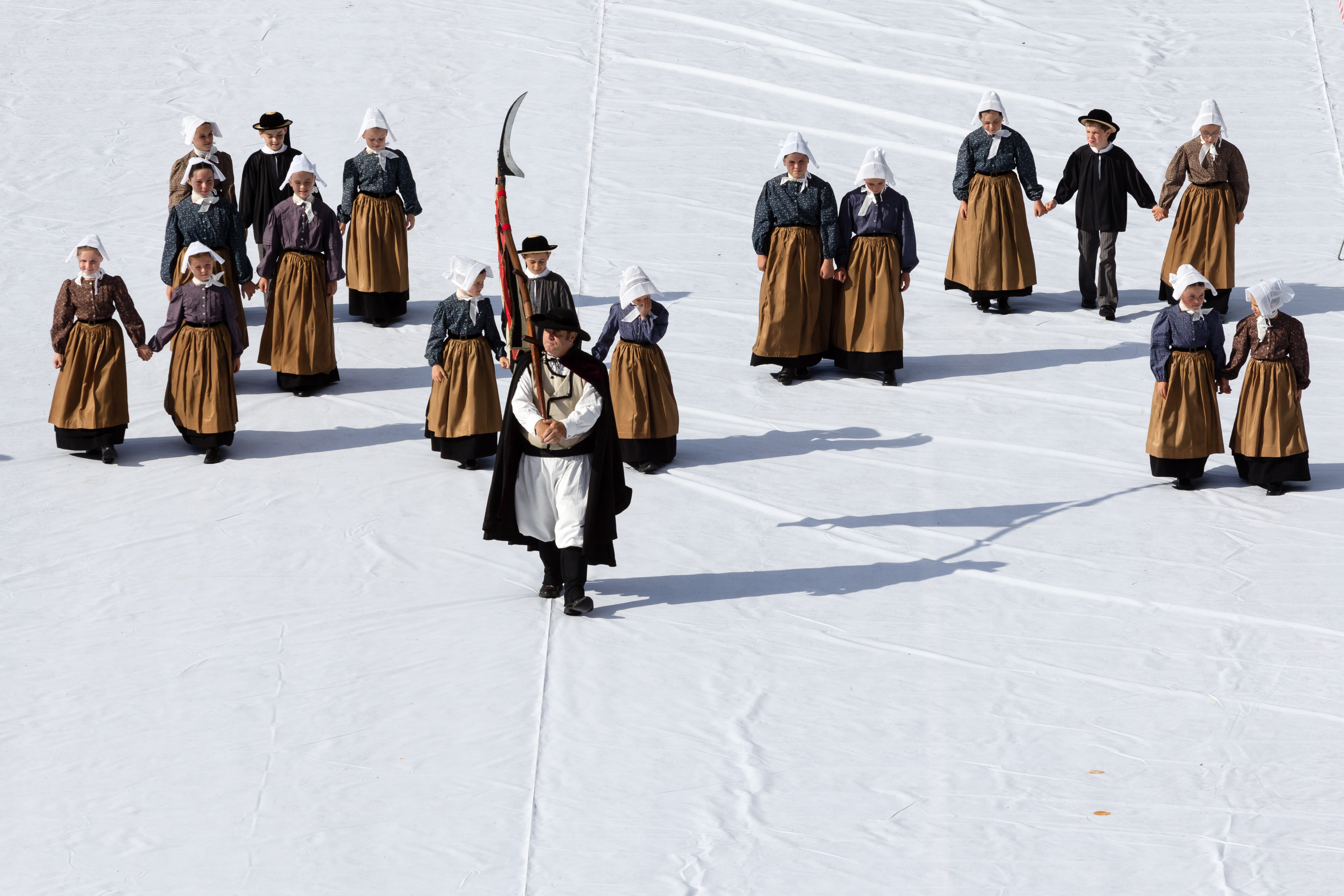 FIL 2012 - Arrivée de la grande parade des nations celtes - Kevrenn Alre